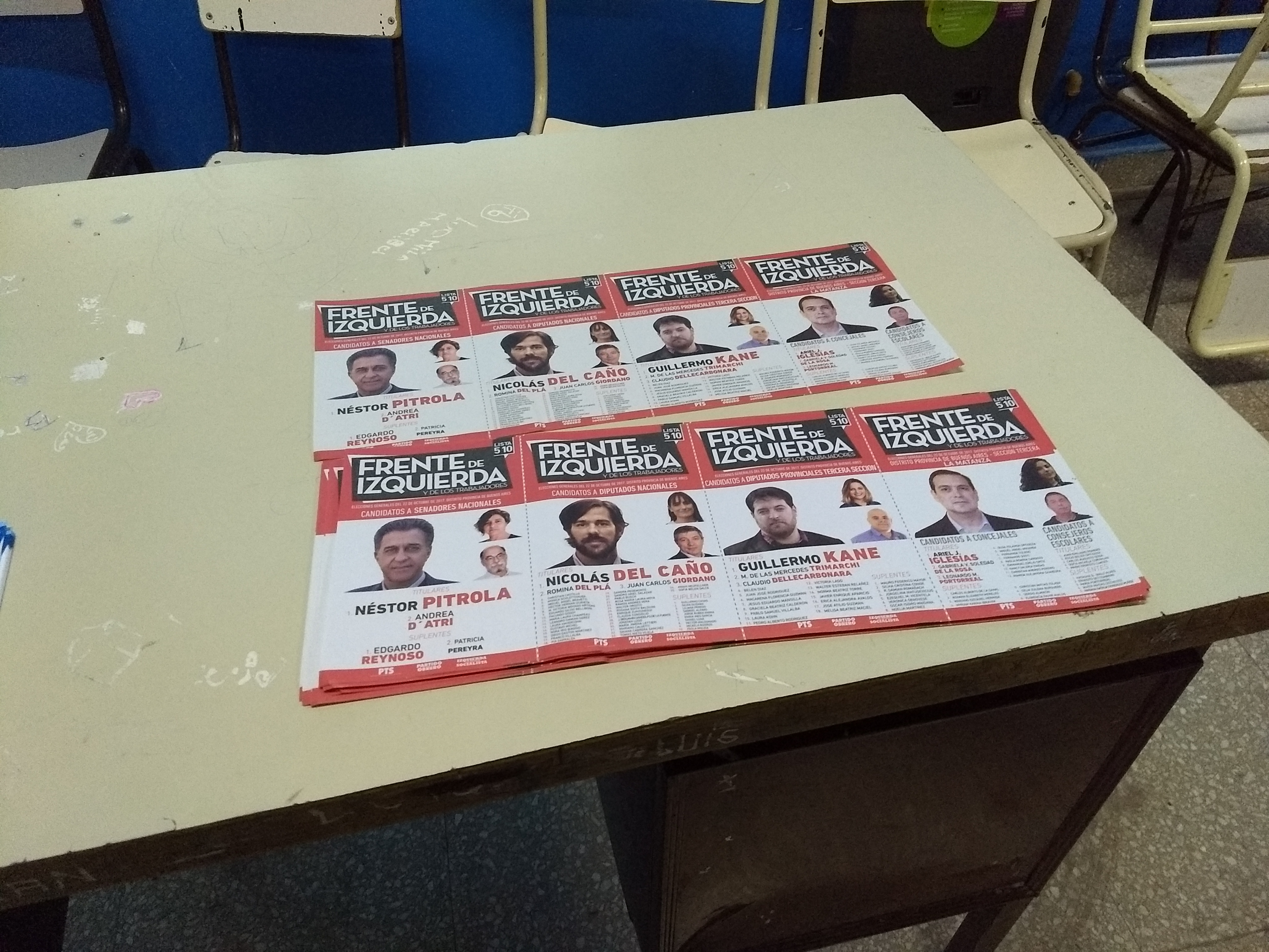 Boletas del Frente de Izquierda, en un cuarto oscuro de la escuela primaria n°184, Rafael Castillo, partido de La Matanza, provincia de Buenos Aires, el día de las elecciones legislativas generales del 22 de octubre de 2017.